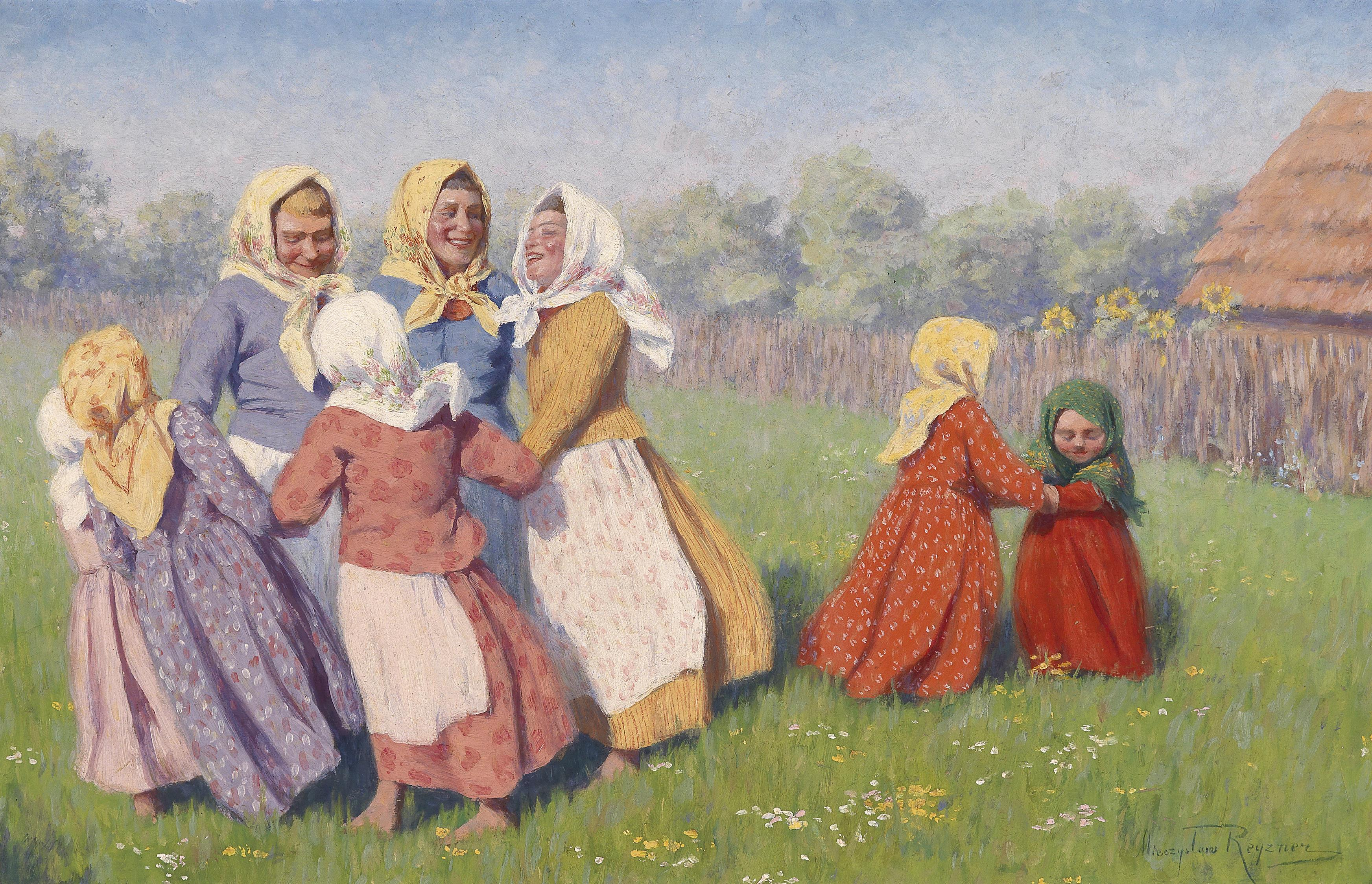 Kinderreigen, signiert Mieczyslaw Reyzner, Öl auf Karton, 41 x 62 cm, gerahmt